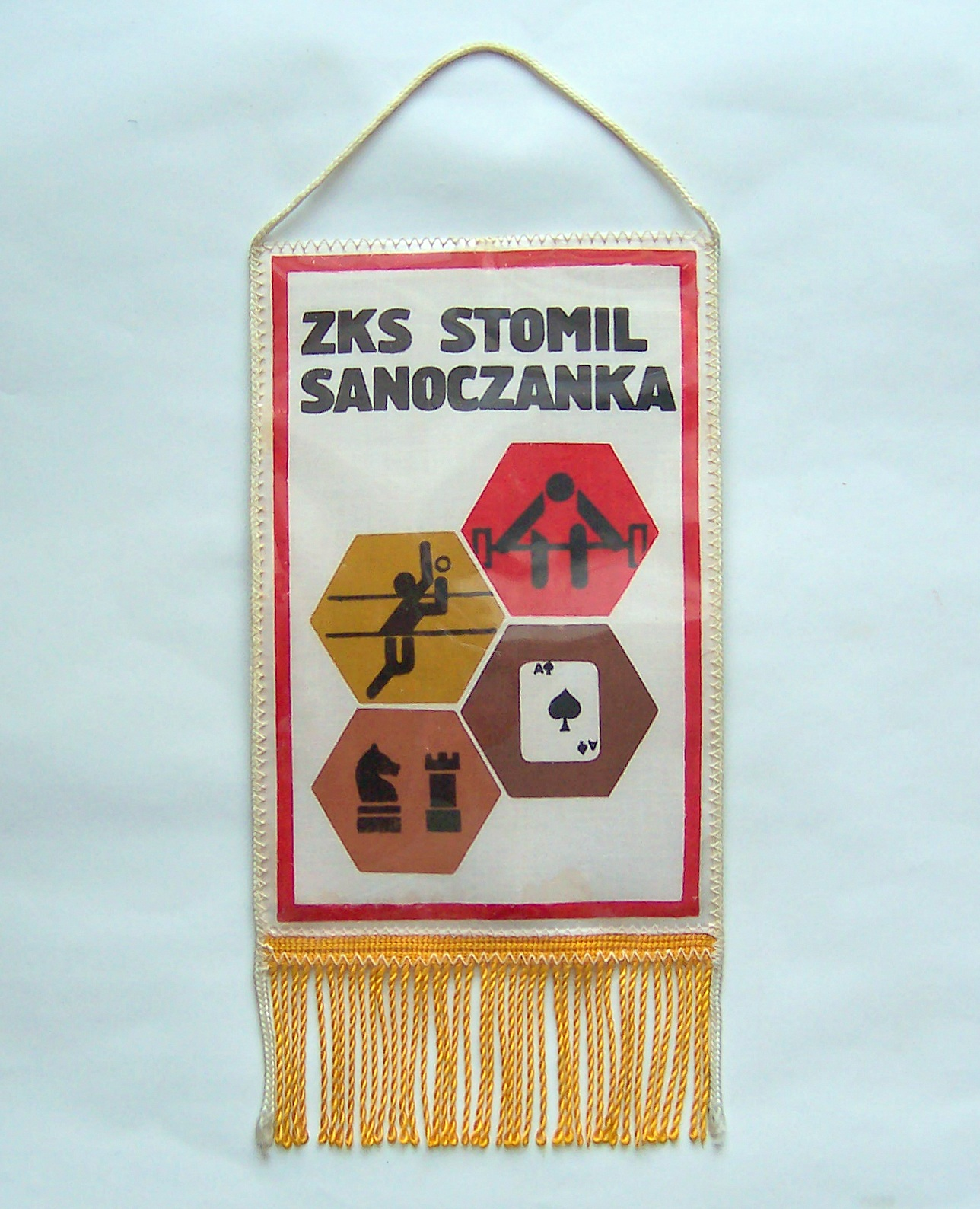 Proporczyk ZKS Sanoczanka Sanok i Sanockich Zakładów Przemysłu Gumowego Stomil Sanok sprzed 1989 roku.